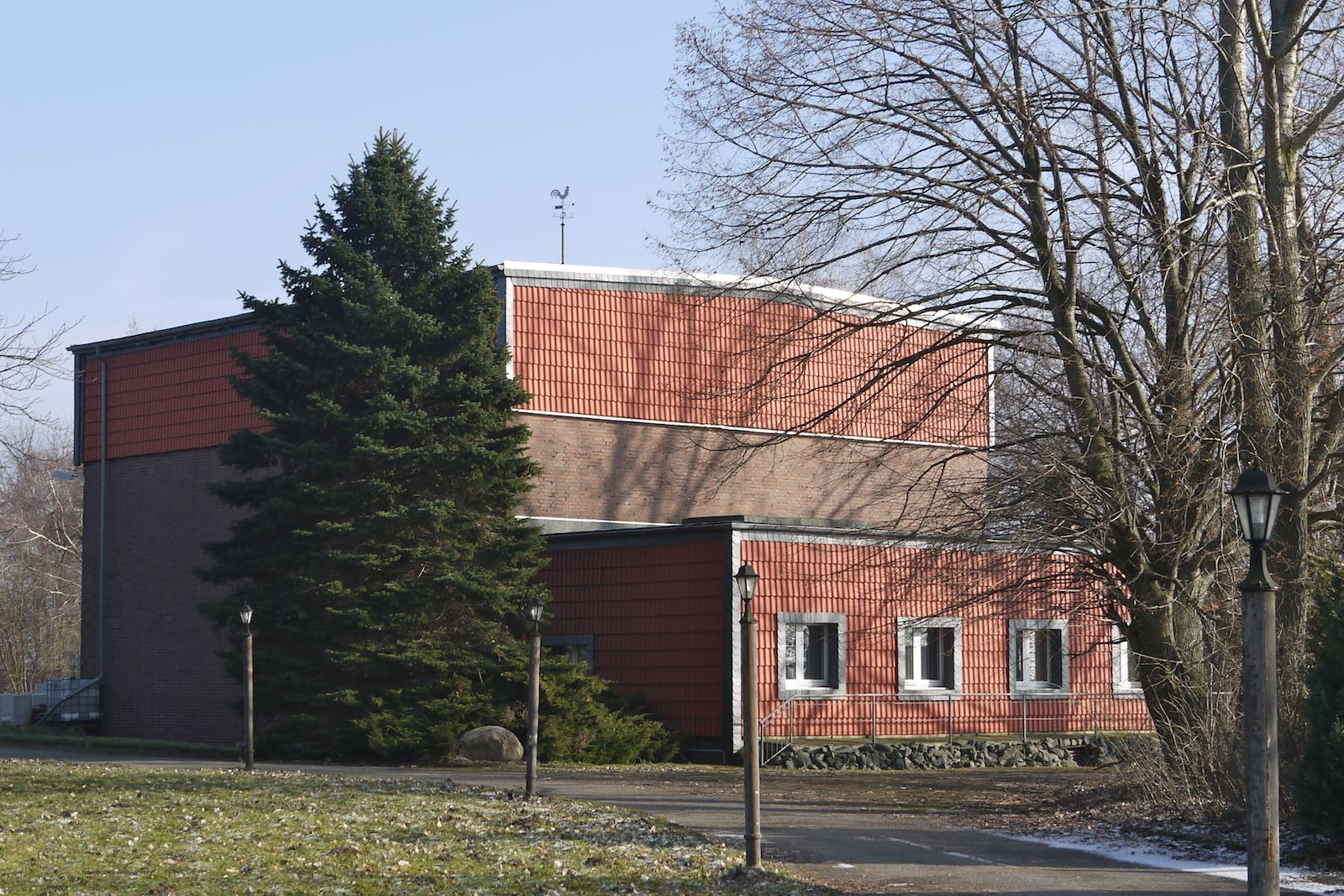 Schachtanlage Galberg bei Salzgitter-Gitter - Ehemaliges Maschinenhaus - Aufnahme 2011